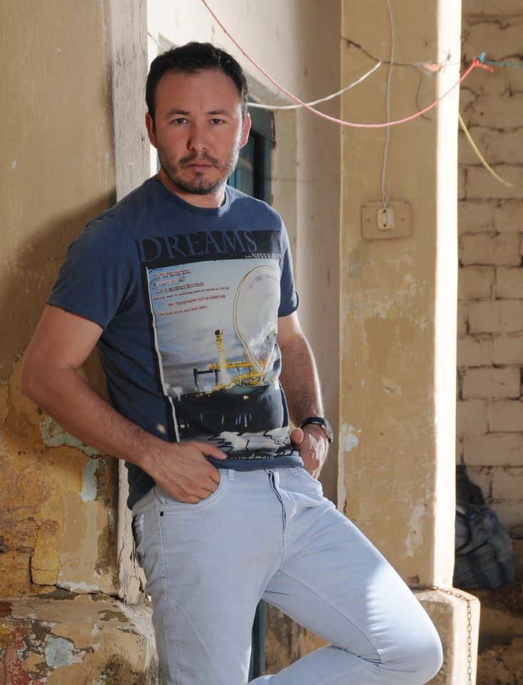 Revista Vida, Ultima Hora